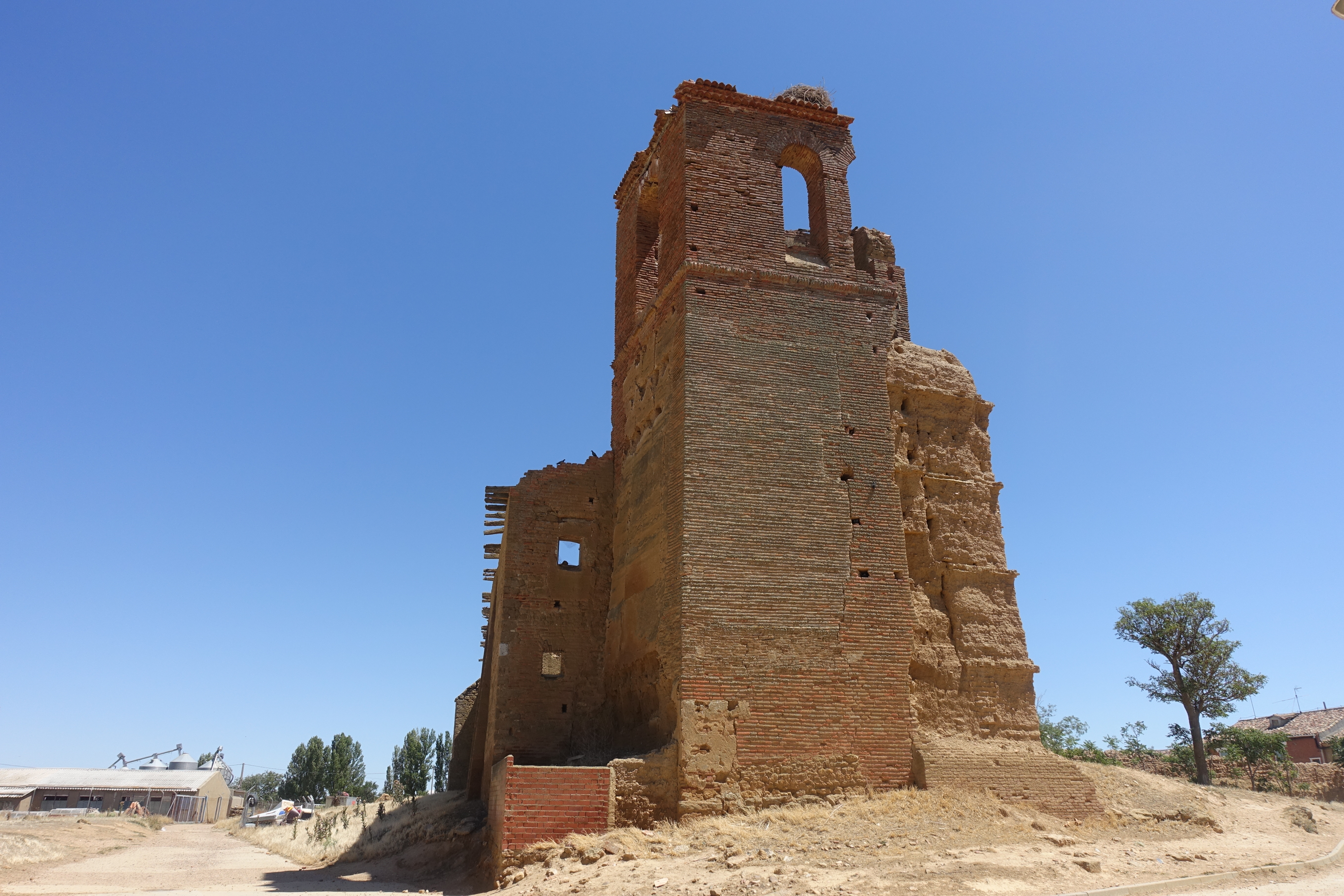 Ruinas de la antigua iglesia de Santo Tomás, Pozuelo de la Orden (Valladolid, España).